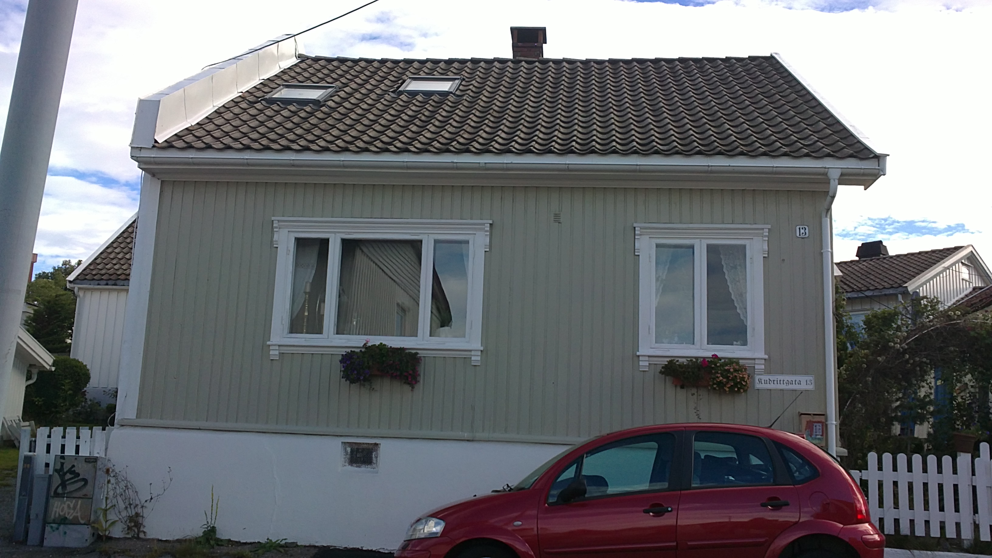 Arne Nordheims barndomshjem